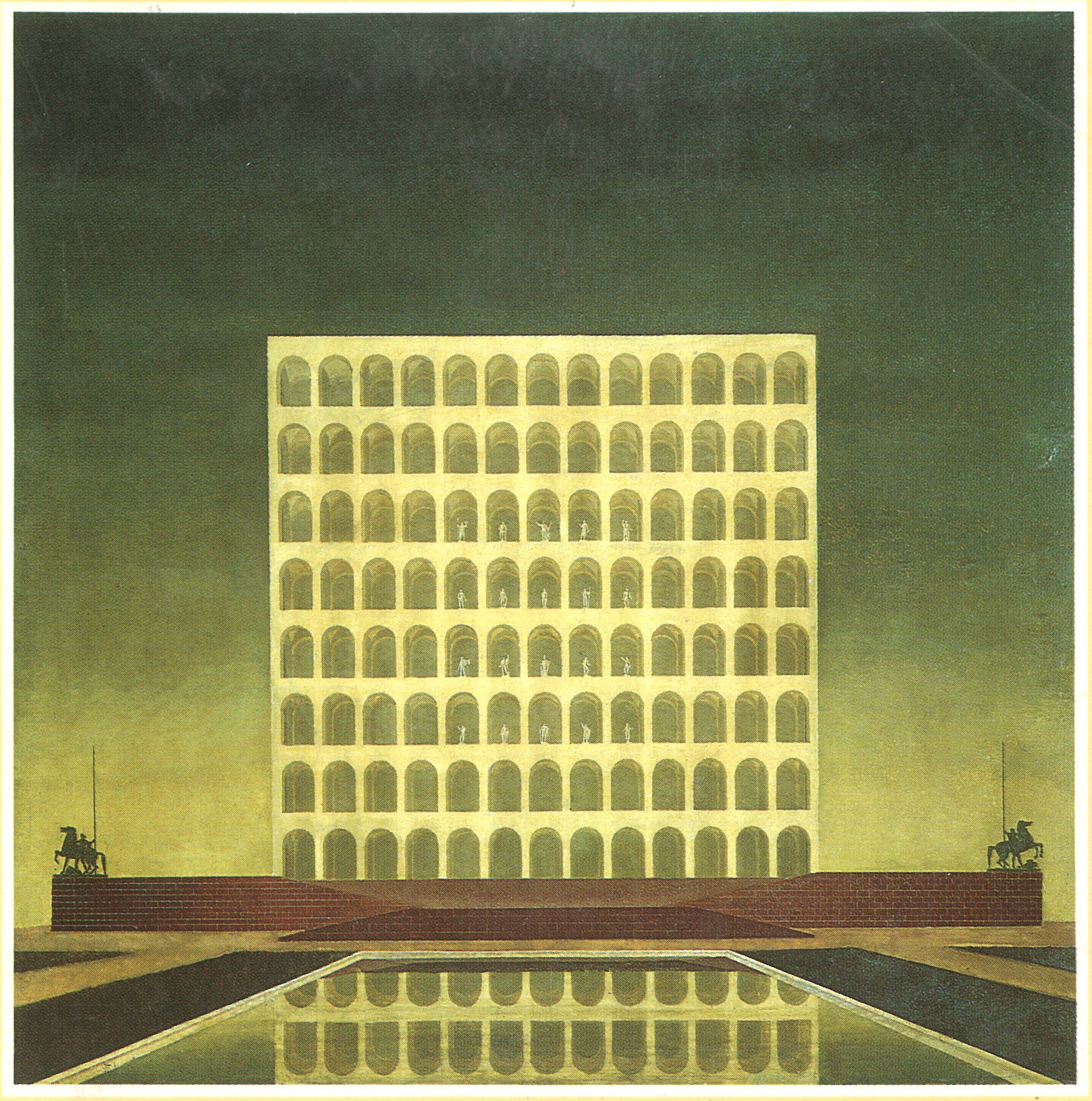 Il file è stato rivato da Bruno Filippo Lapadula dalla foto eseguita dallo stesso Bruno Filippo Lapadula del quadro ad olio dipinto nel 1937 da Ernesto Lapadula per il concorso del palazzo dela Civiltà Italiana relativo al progetto vincitore di Ernesto Lapadula, Mario Romano e Giovanni Guerrini. Il negativo è depositato presso l'Archivio Lapadula di Roma, dichiarato di notevole interesse storico e vincolato dalla Soprintendenza Archivistica per il Lazio. L'archivio Lapadula e gli eredi di Ernesto Lapadula sono titolari dei diritti d'autore. L'originale del quadro è attualmente esposto al Museum of Modern Art di New York.